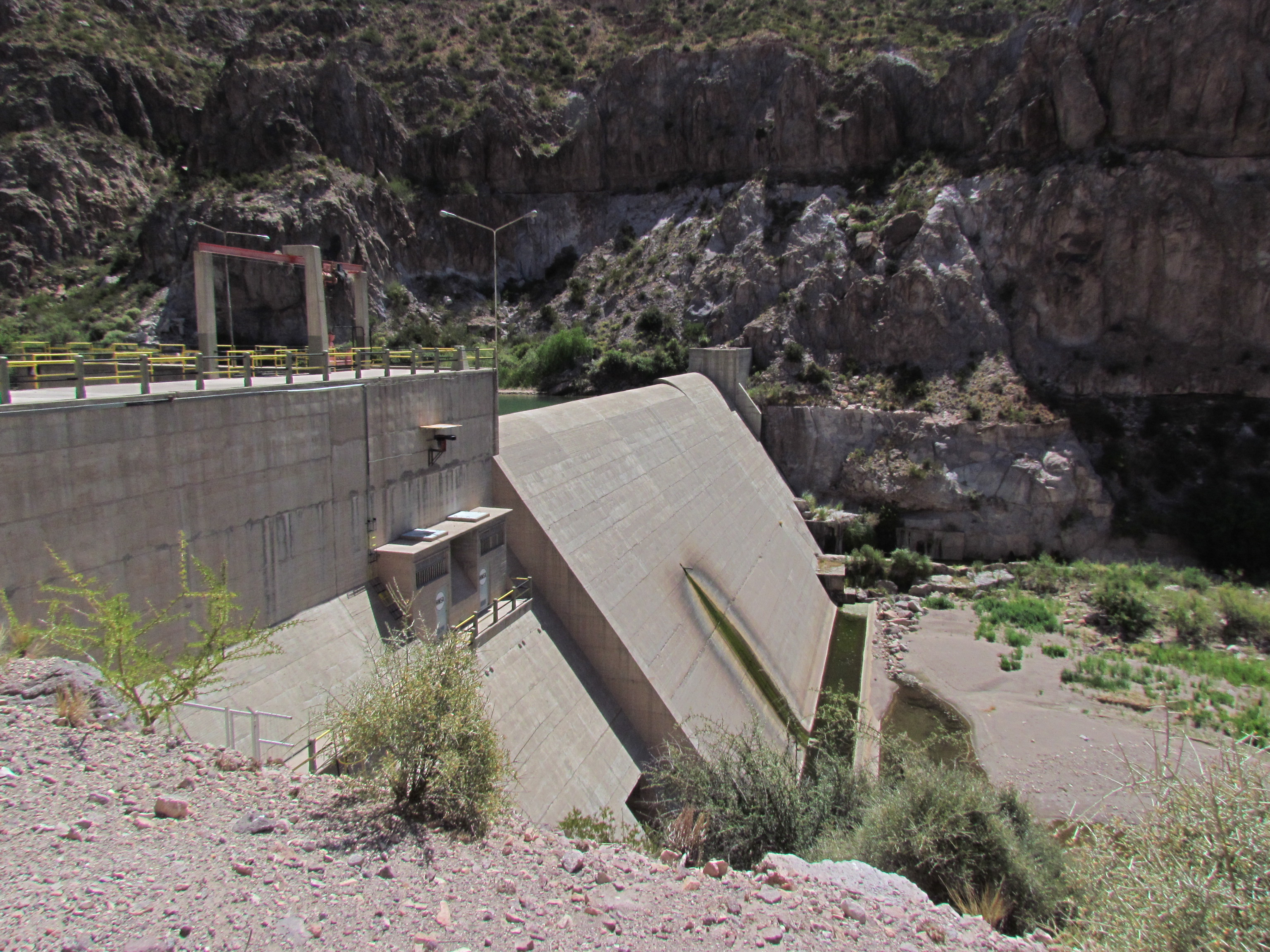 Vista aguas arriba de la presa Tierras Blancas